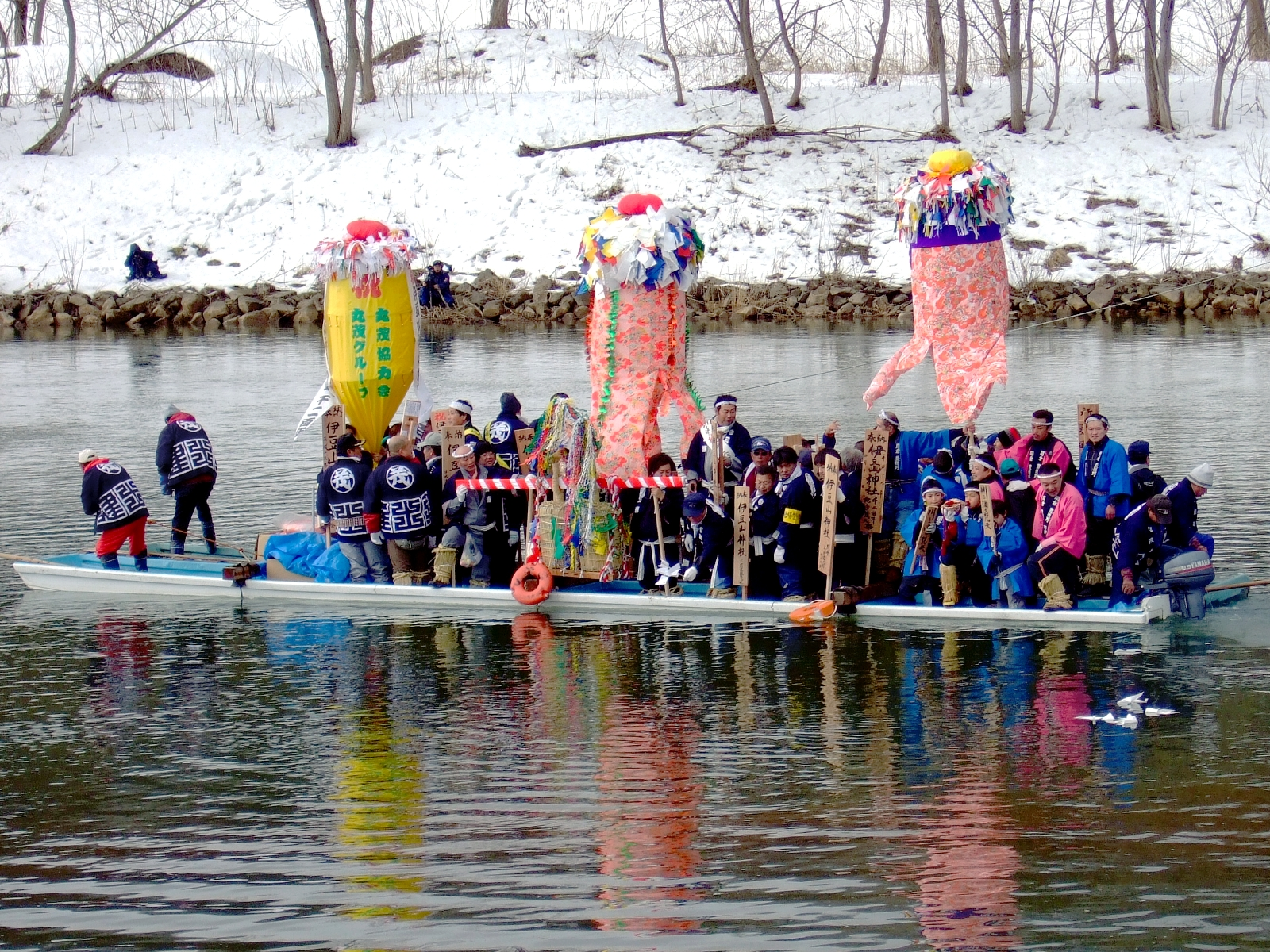 秋田県大仙市で行われる小正月行事、「川を渡る梵天」。